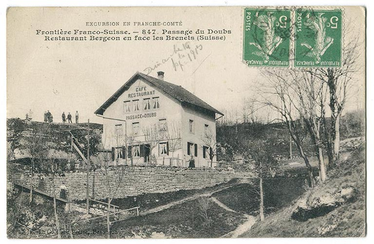 Chaillexon (commune Villers-le-Lac): Maison de Rosalie Bouverot (1783–1855), quatrième épouse et collaboratrice de l’opticien Pierre-Louis Guinand (1748–1824) des Brenets, construit au bord du Doubs en 1848.